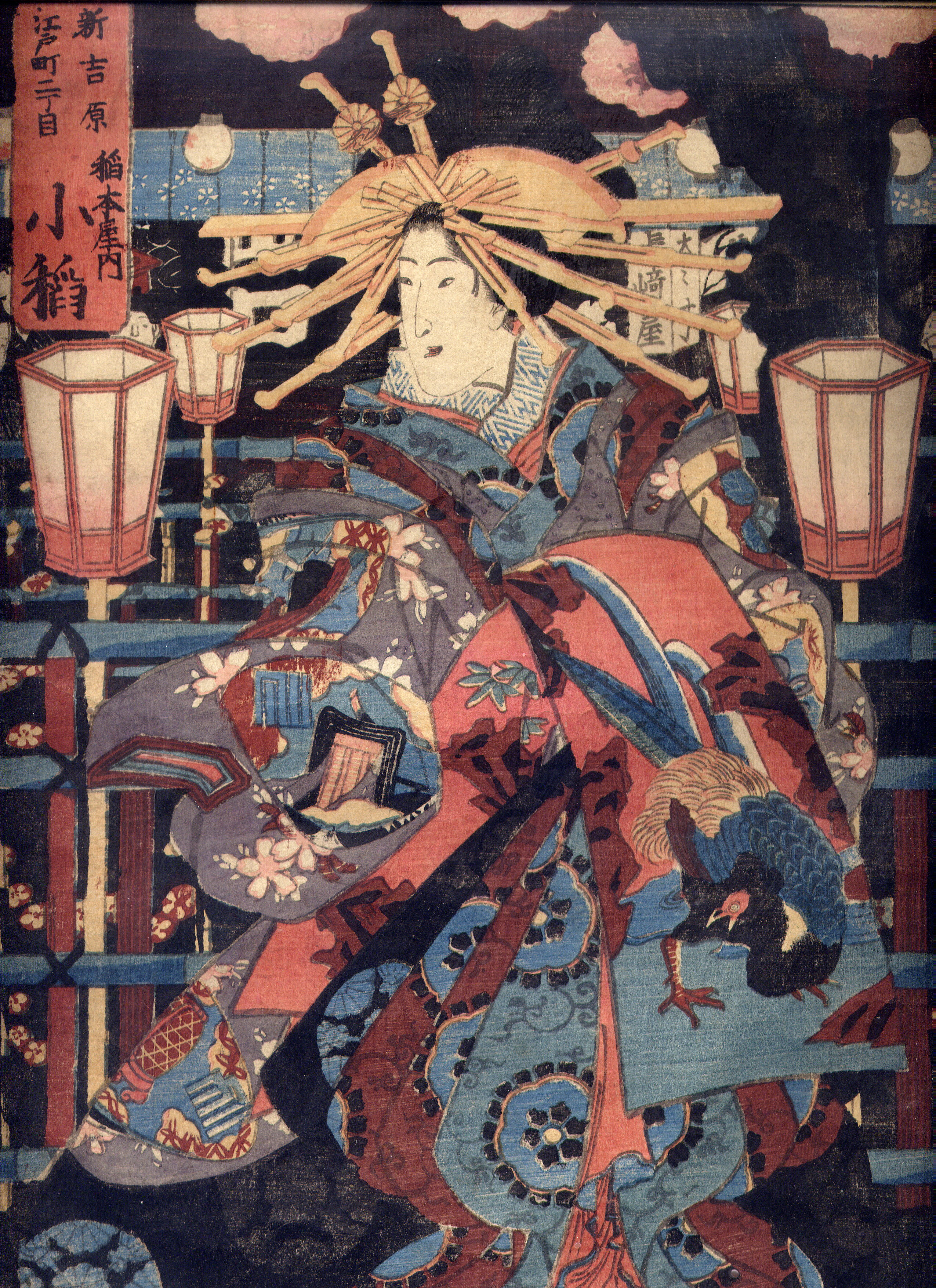 Estampe japonaise représentant une femme revêtue d'un kimono. Date du XIXème siècle non précisée (Datant d'avant 1895). Avec inscription en caractères japonais non déchiffrée. Peut-être actrice kabuki?